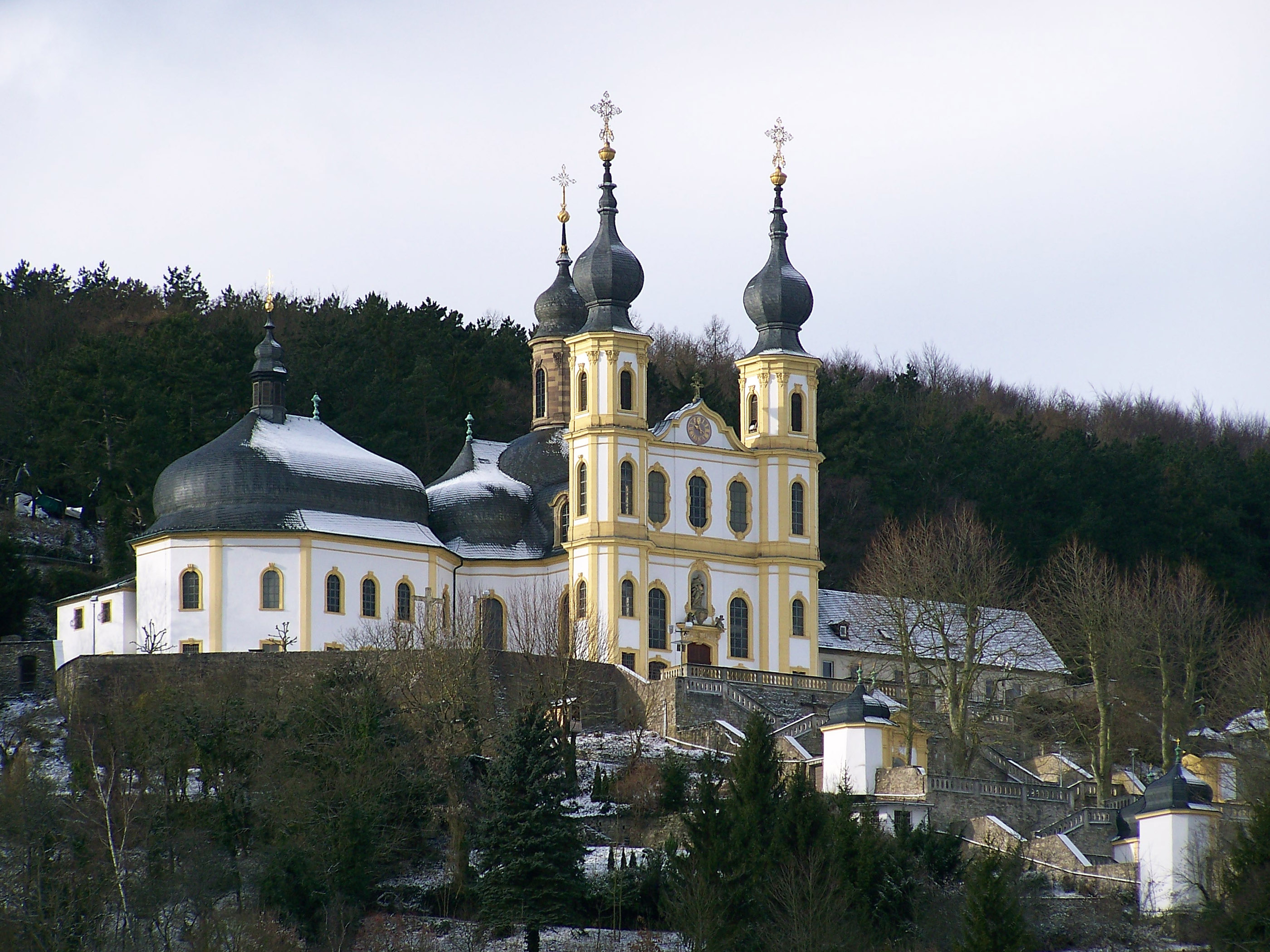 Das Käppele in Würzburg von der Ludwigsbrücke aus gesehen